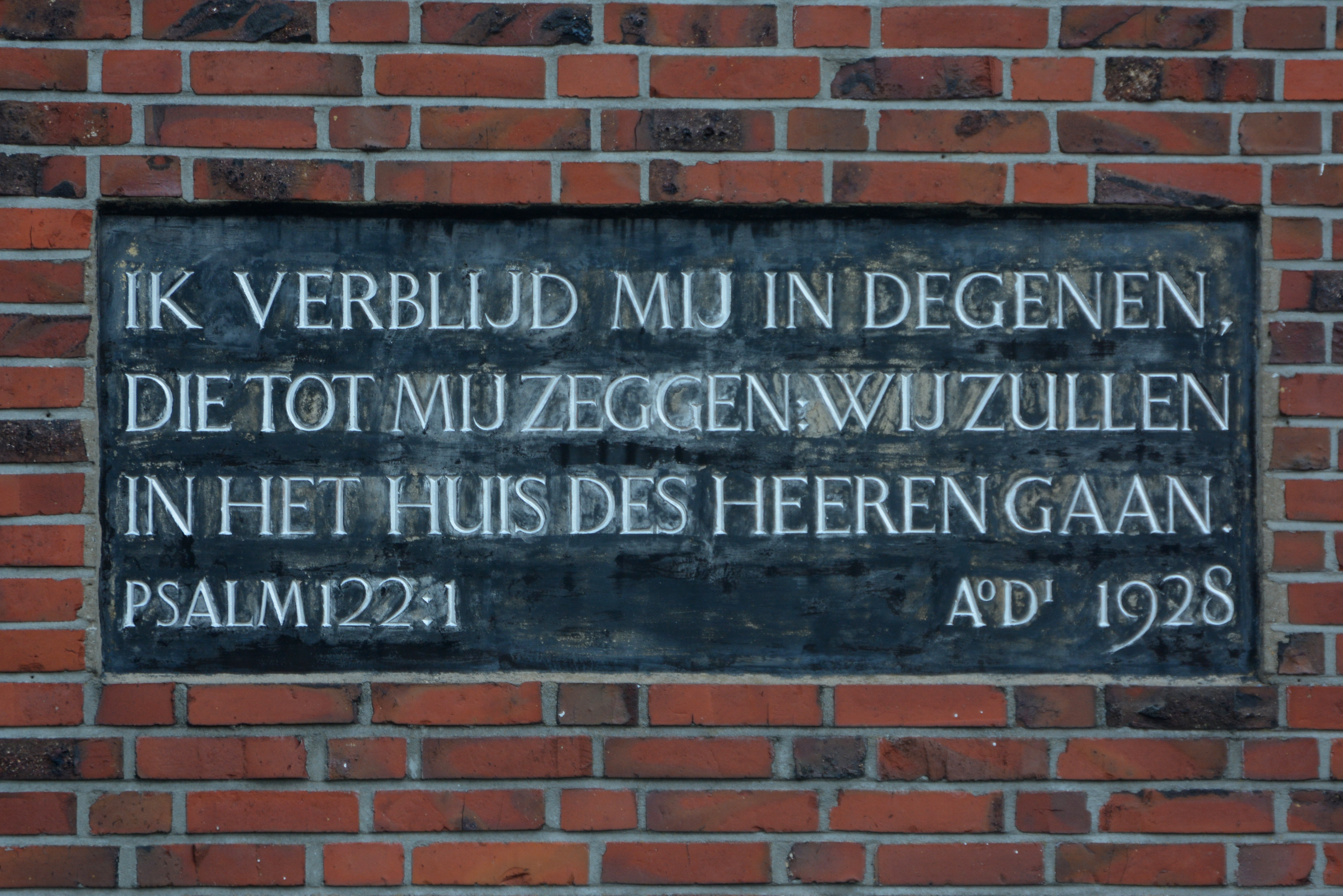 Harkema, PKN-kerk (gevelsteen